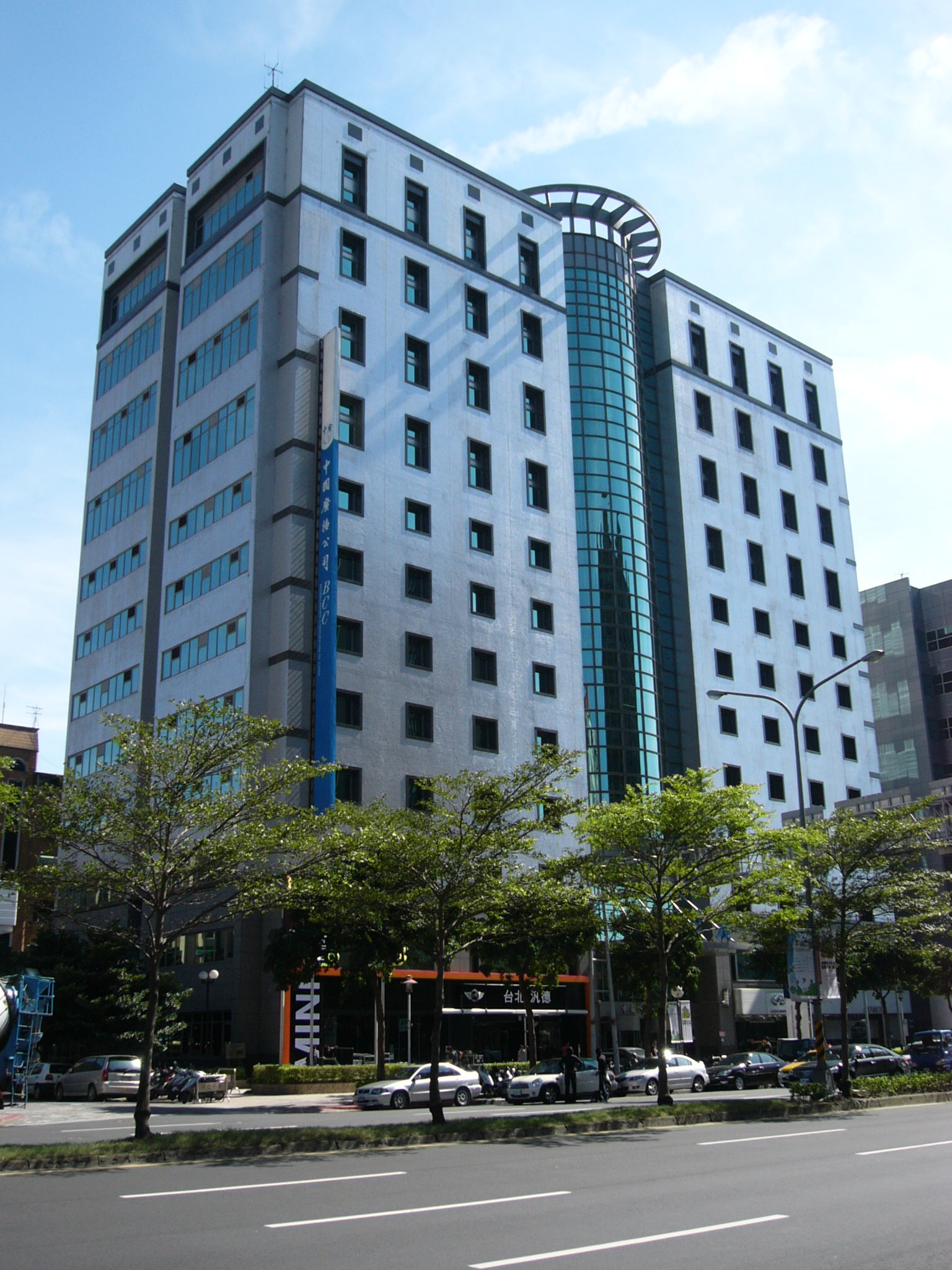 中廣松江大樓左前方外觀，地址：臺北市中山區松江路375號。